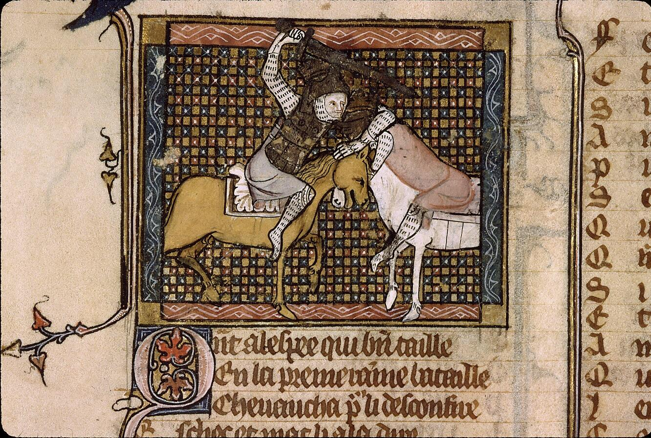 Manfred tué par Charles d'Anjou Miniature de 1350-1360 Le Roman de la Rose Paris - Bibl. Sainte-Geneviève - ms. 1126